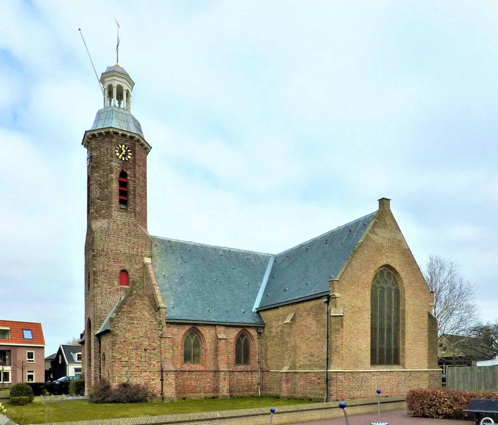 Sint Martinus ('s-Gravenpolder)